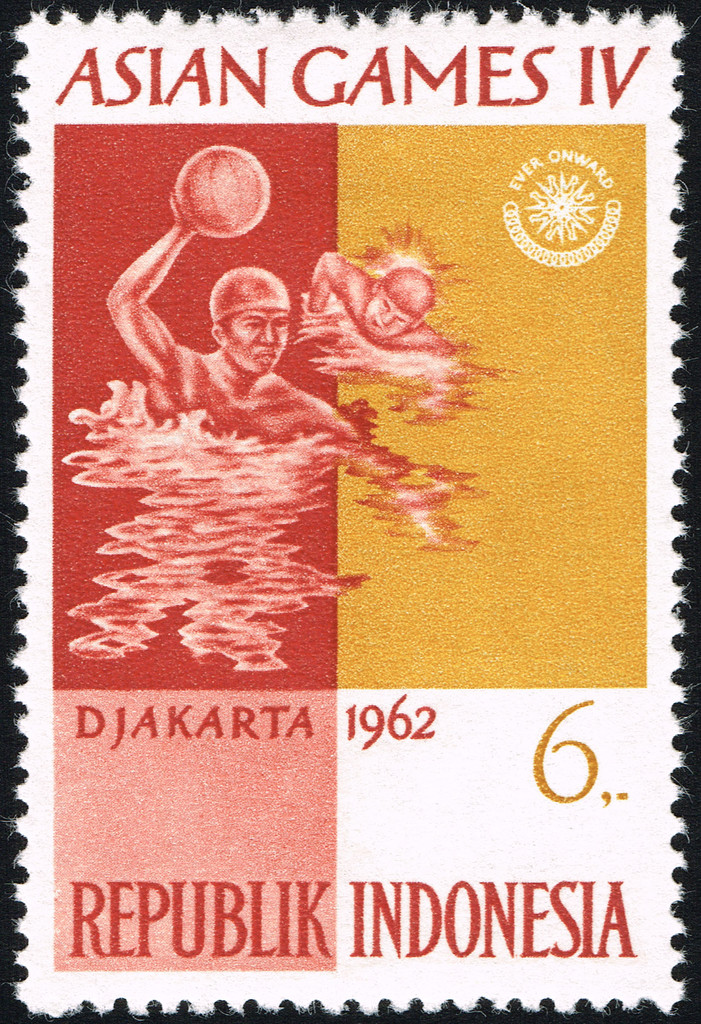 Asian Games IV